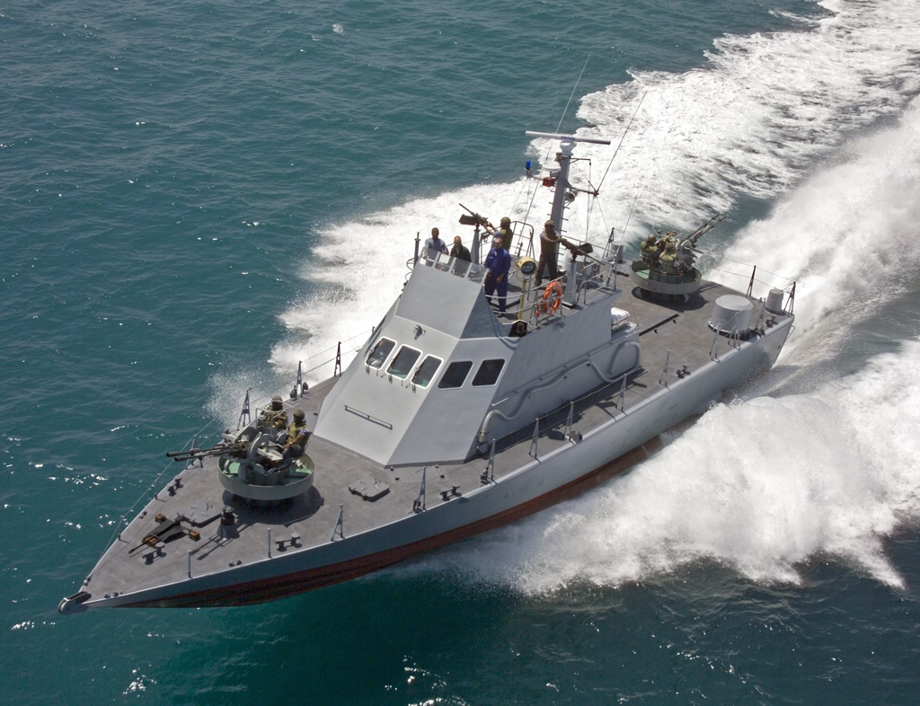 ספינה לבטחון שוטף מסדרת שלדג סימן מתוצרת מספנות ישראל